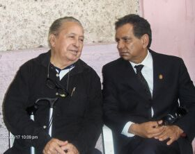 En esta foto, aparece Melitón Reyes con Fidel Herrera Beltrán, gobernador de Veracruz, en el sepelio de su nieta Karina Reyes Luna.